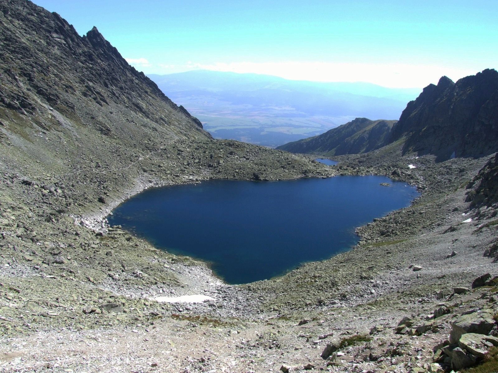 Wyżni Furkotny Staw (Dolina Młynicka, Tatry Wysokie)